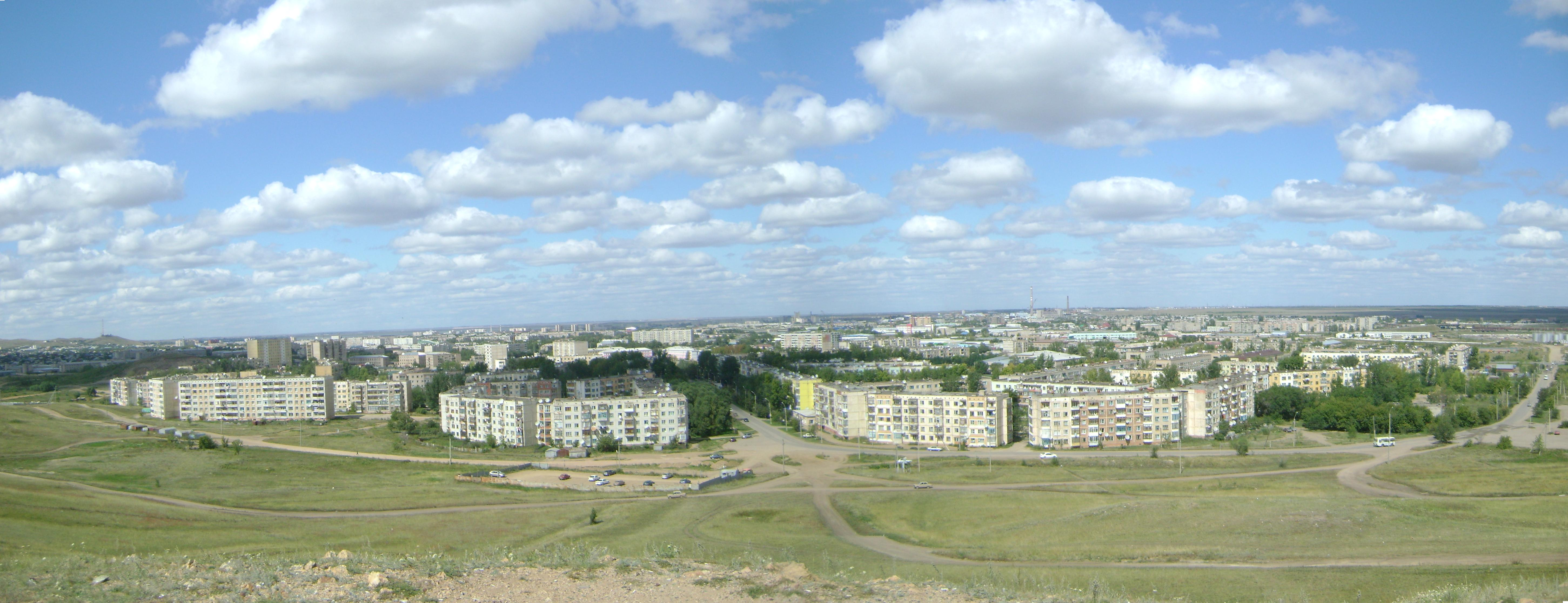 Панорама_кокшетау